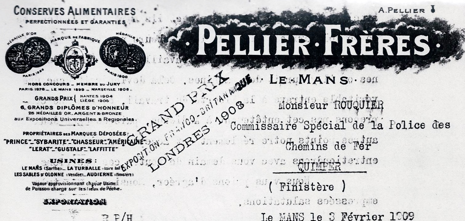 En-tête des établissements "Pellier Frères" (lettre de 1909).[une conserverie à Audierne]